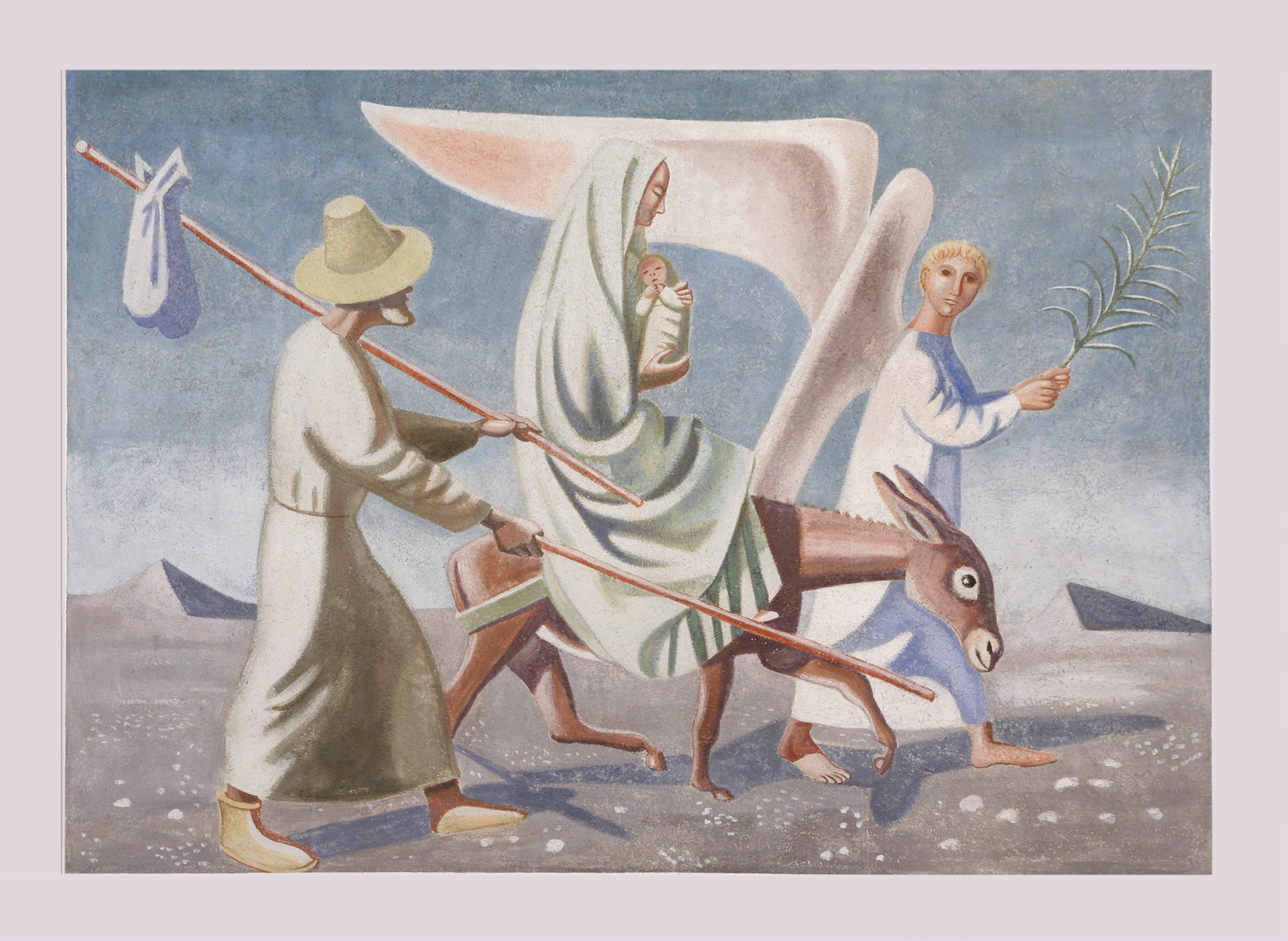 Römisch-katholische Pfarrkirche St. Theresia Zürich-Friesenberg, Fresko von Richard Seewald